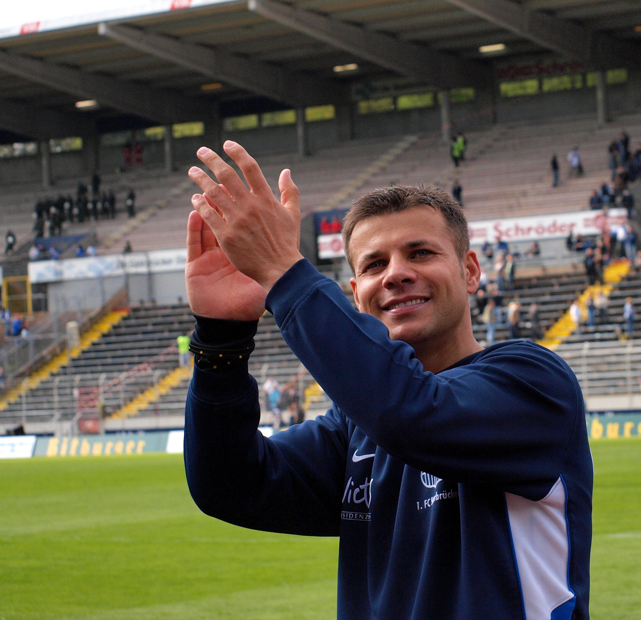 Enver Marina bedankt sich nach dem Spiel für die Untersützung der Fans aus dem F - Block